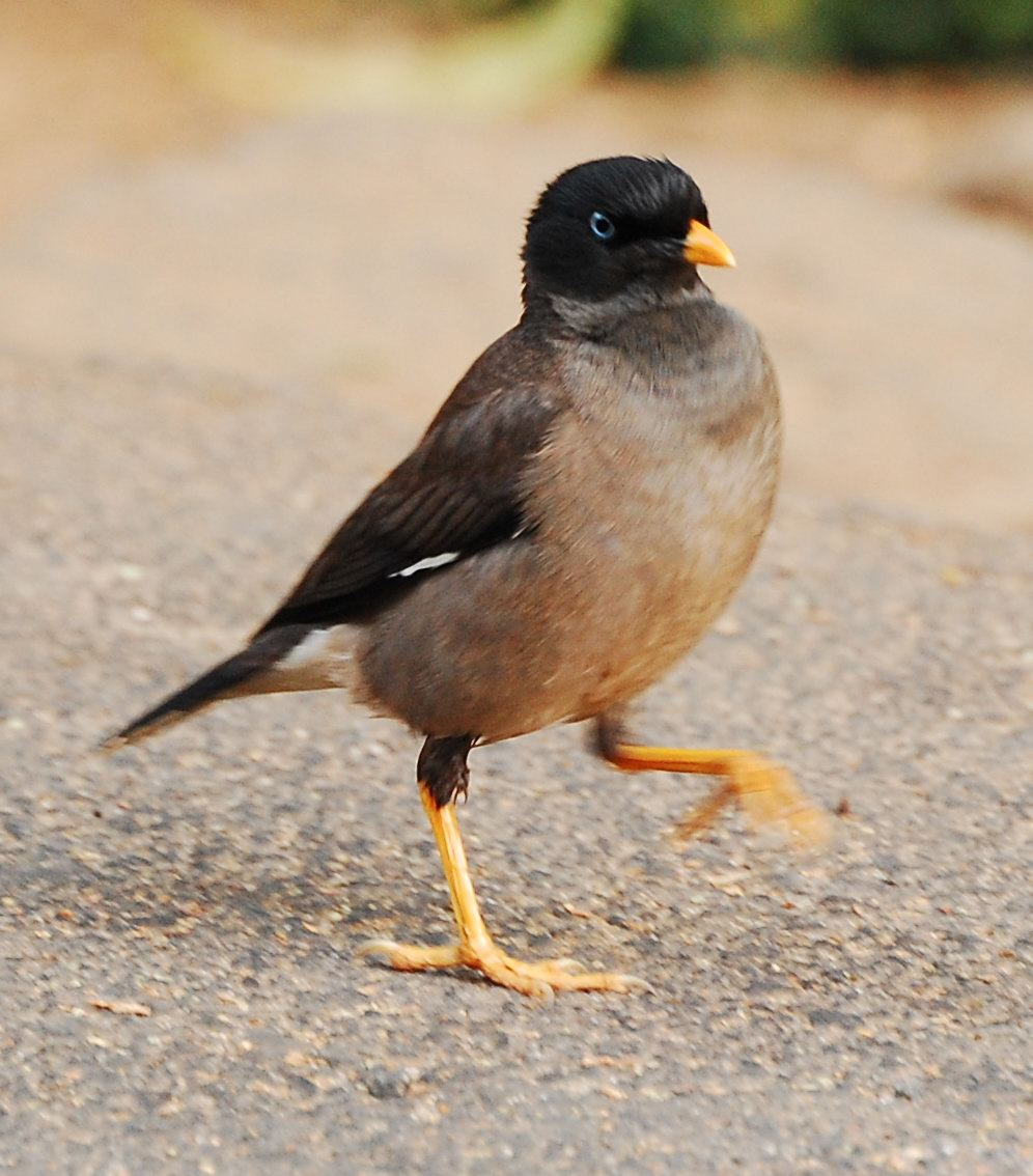 കാട്ടുമൈന അഥവാ കിന്നരി മൈന